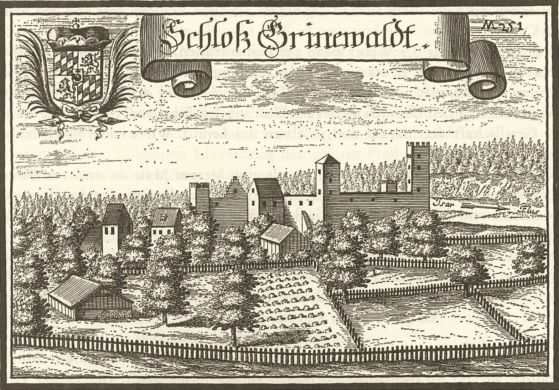 de: Schloss Grünwald (bei München), Kupferstich von Michael Wening um 1700